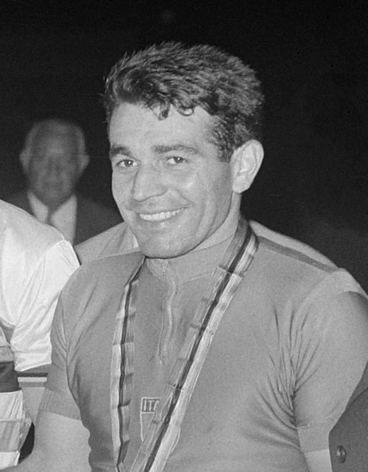 WK Wielrennen. Borghetti (Italië)